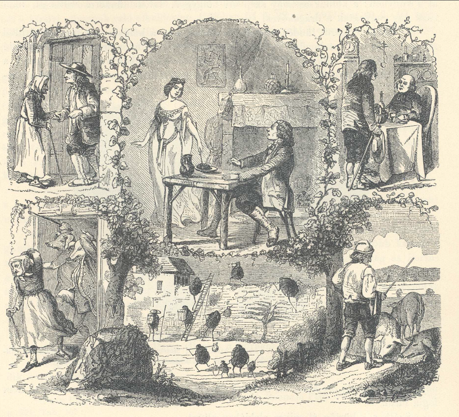 La légende de la truffe du Périgord